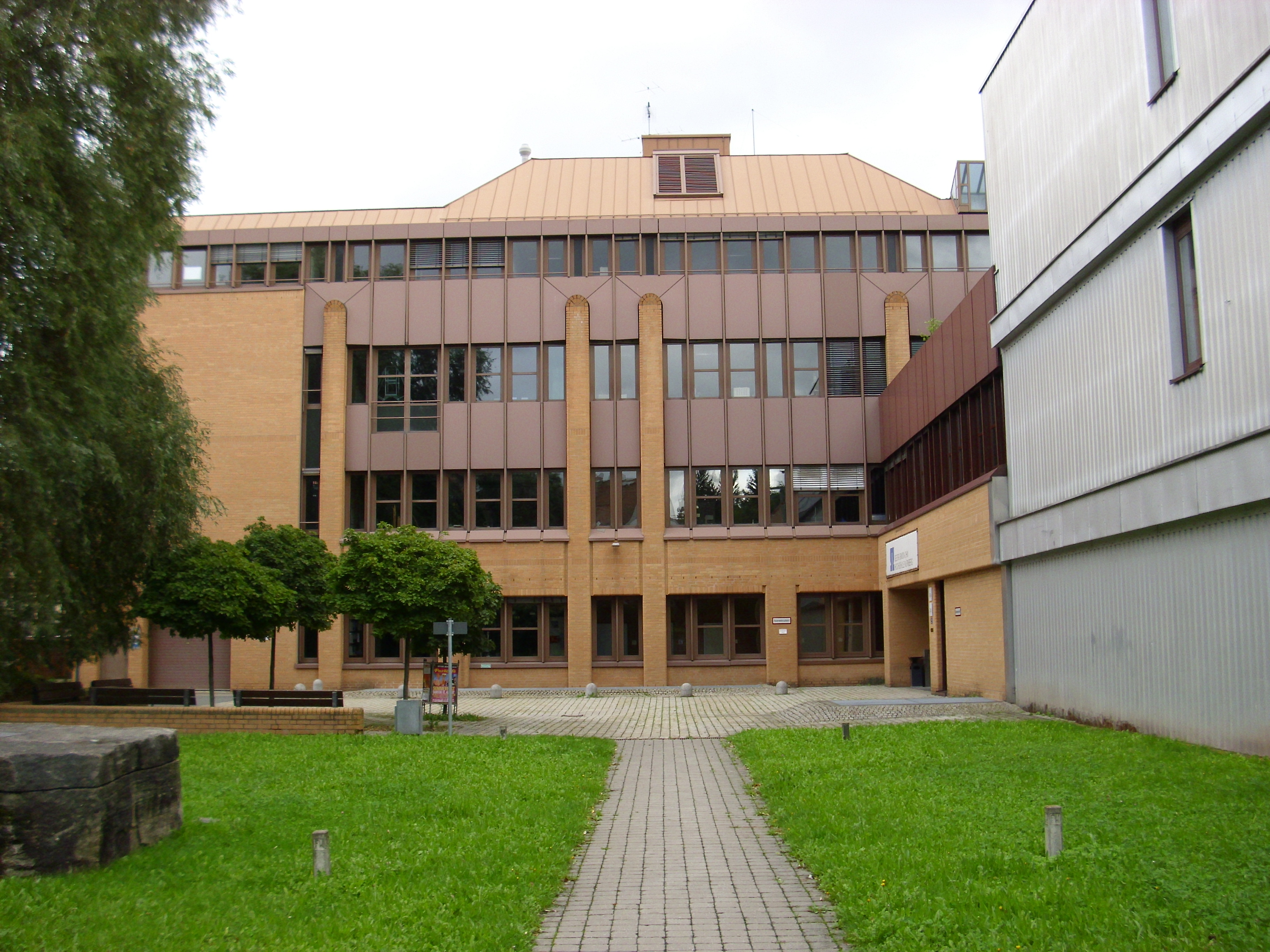 Südseite des WD-Gebäudes (Verfahrenstechnik) und Westseite des WG-Gebäudes (Design) am Standort Wassertorstraße der TH